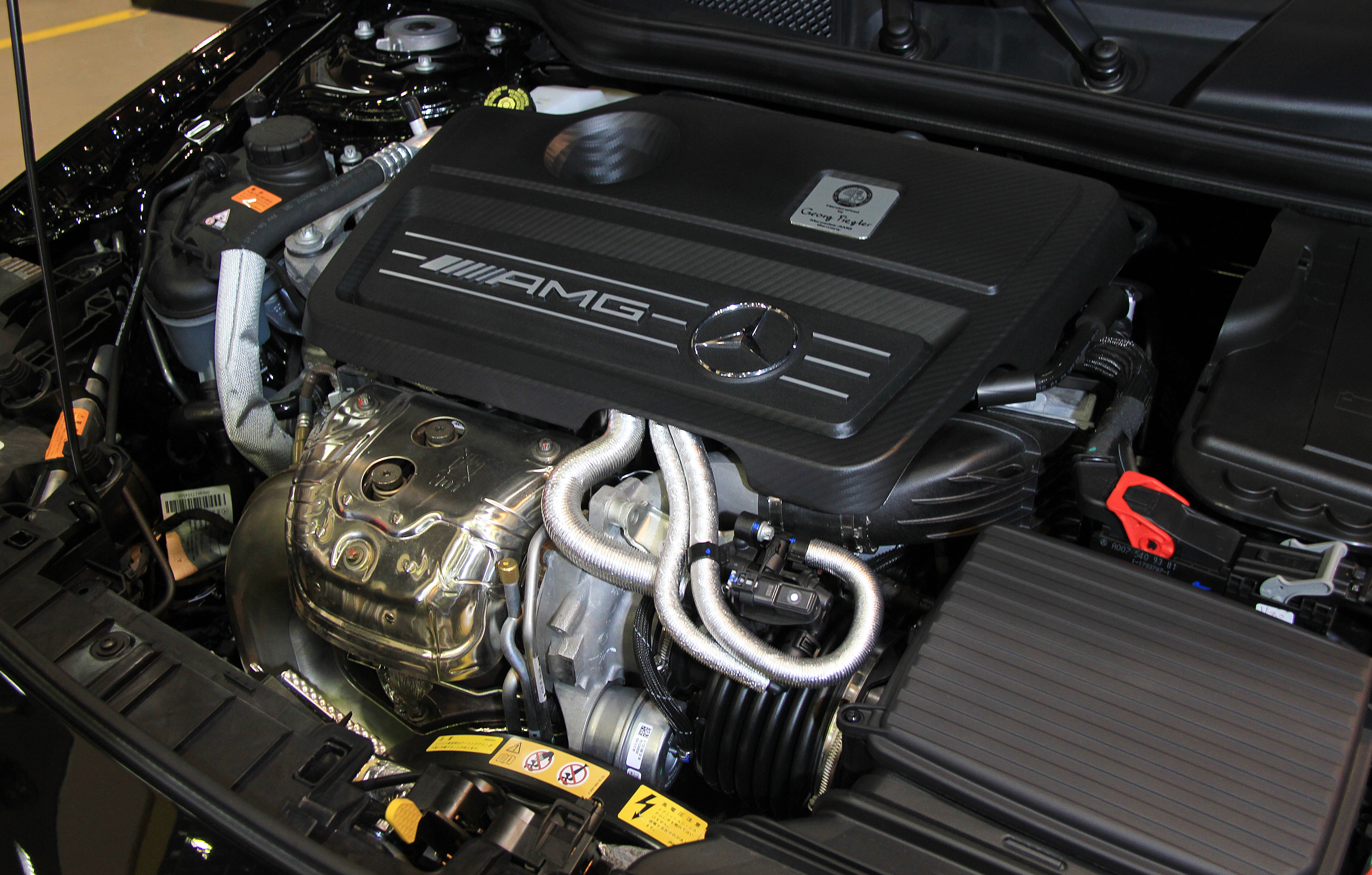 Mercedes-Benz GLA45 AMG 4MATIC